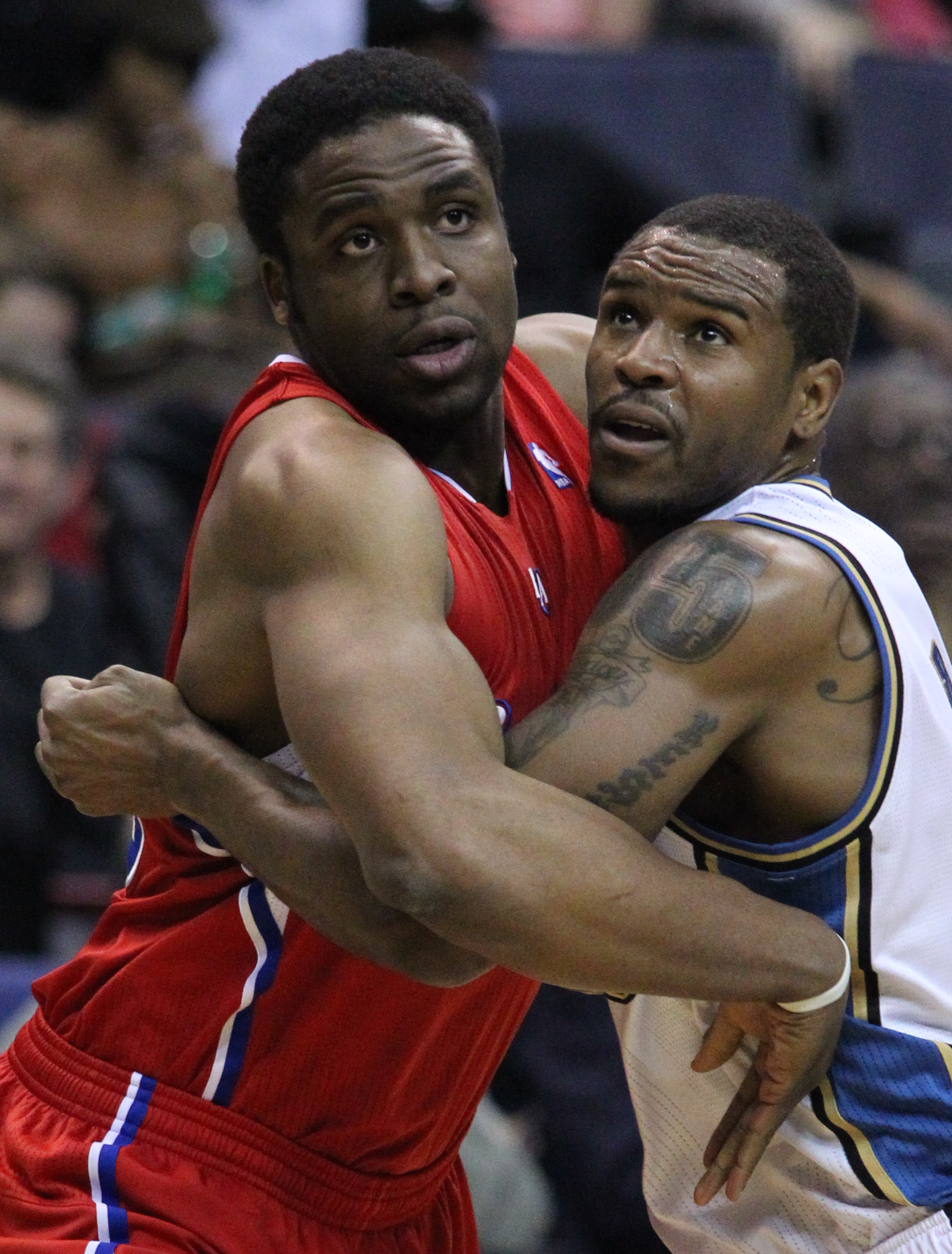 Wizards v/s Clippers 03/12/11